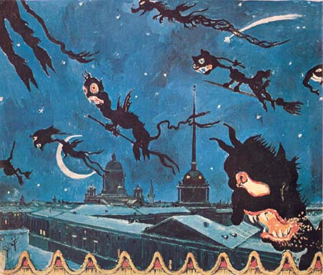 Ночной Петербург. Эскиз декорации к балету И. Стравинского Петрушка